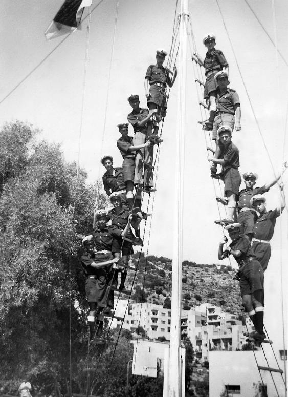 קדטים מחזור א על תורן בית הספר